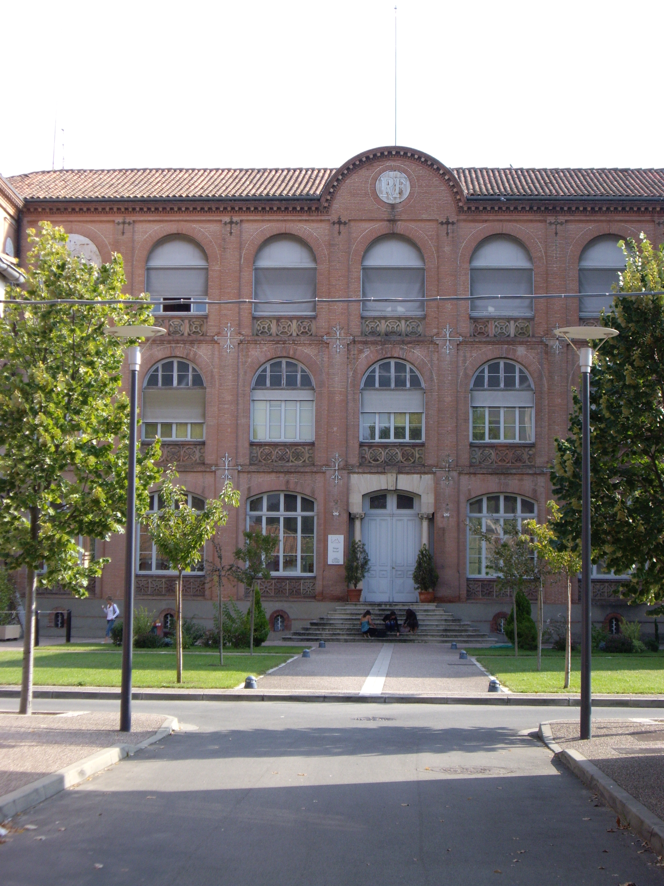 Toulouse (Haute-Garonne, Midi-Pyrénées, France) : L'IUFM Saint-Agne.